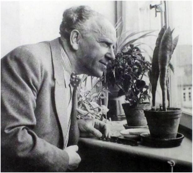 תמונה של האמן פרידריך אדלר